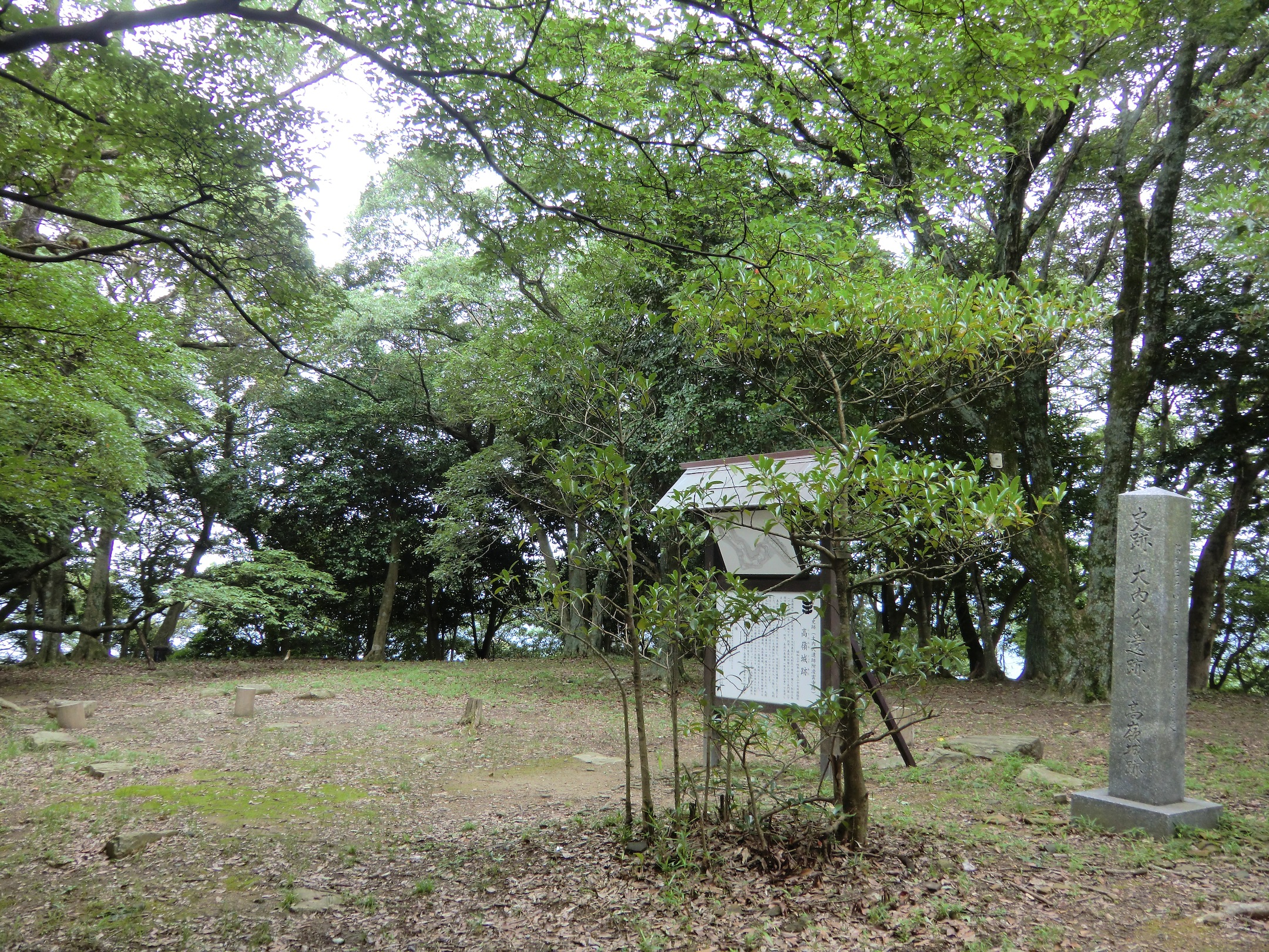 高嶺城跡の主郭付近（山口県山口市）